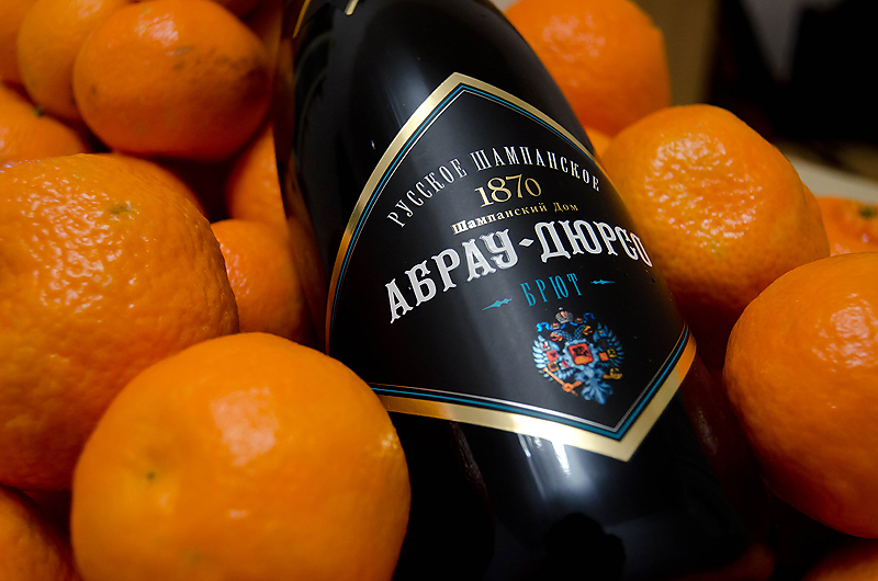 «Абрау-Дюрсо» брют